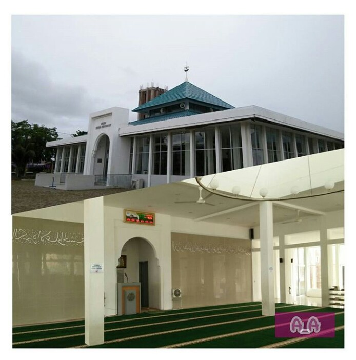 Eksterior dan Interior Mesjid Abdurrauf Banda Aceh